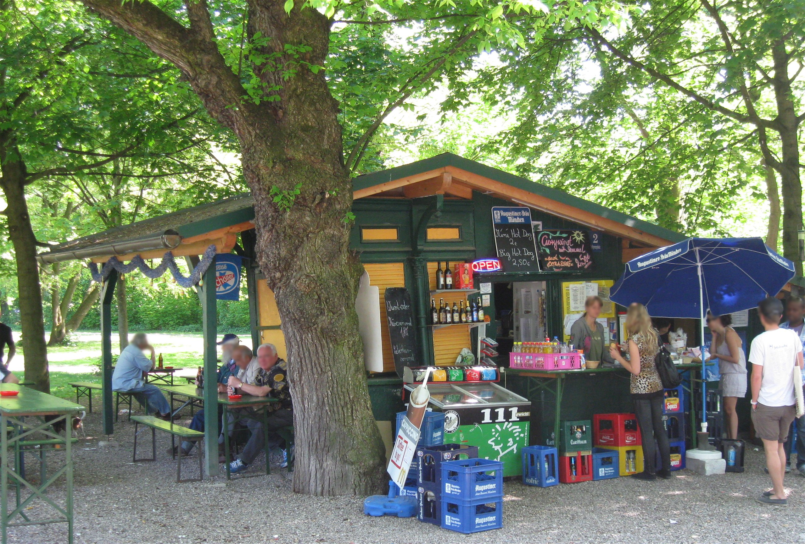 Schyrenplatz 2; Kiosk, Holzkonstruktion mit Gusseisen auf gemauertem Sockel, 2. Hälfte 19. Jh., Zierformen Neurenaissance.